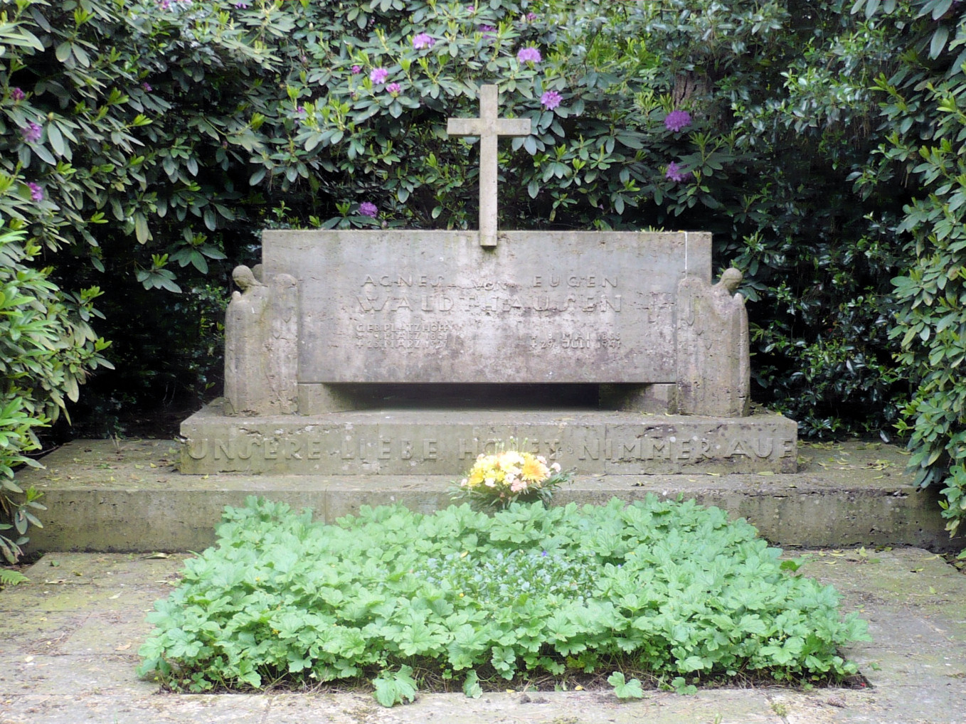 Grabmal von Eugen und Agnes Waldthausen auf dem Friedhof Bredeney in Essen, im Dezember 2012 zum Ehrengrab der Stadt Essen erklärt